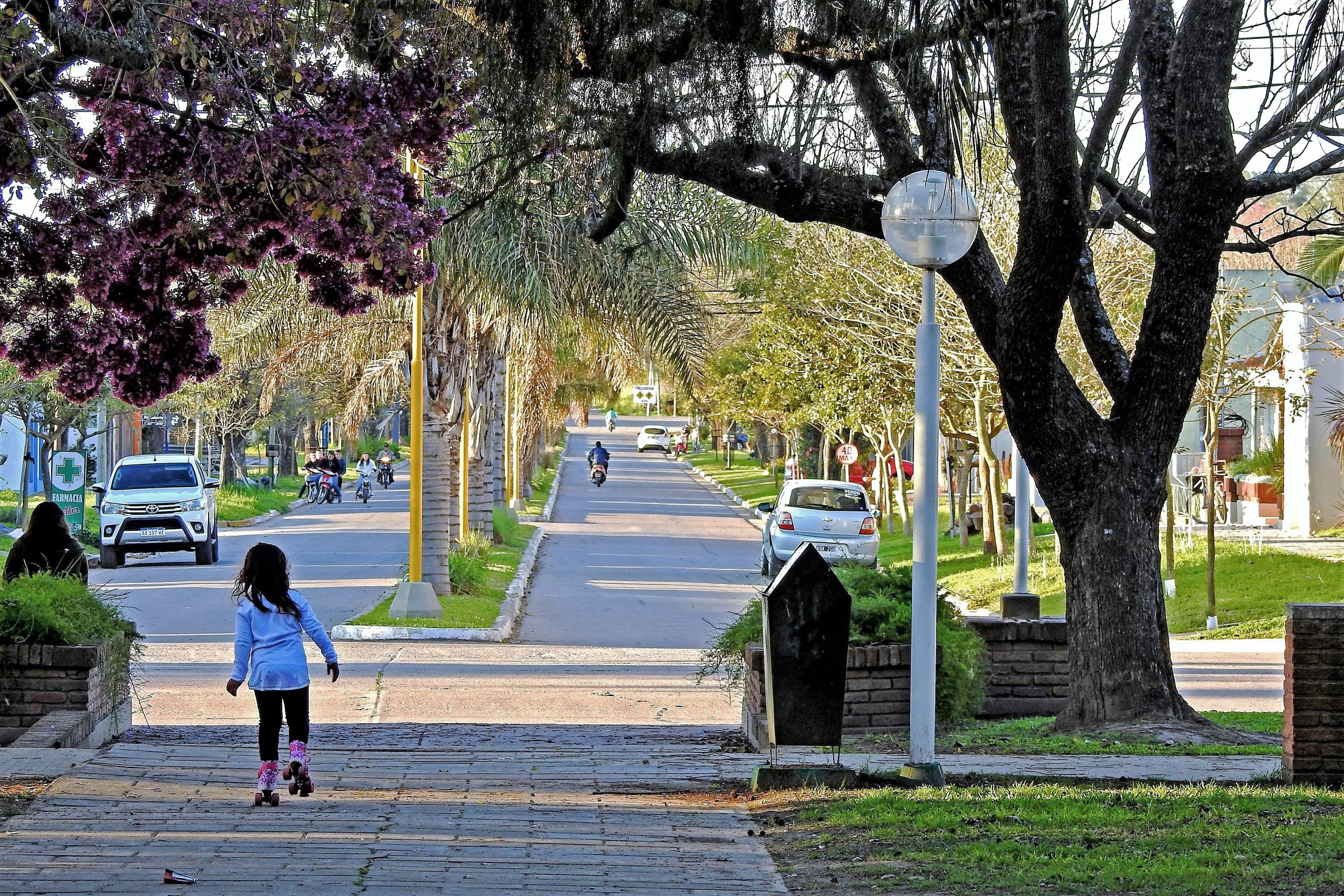 Testimonio descriptivo de un aspecto urbano de Progreso (Santa Fe)